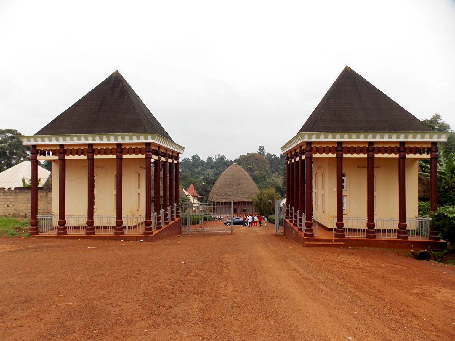 La grande entré qui mène directement dans la chefferie Bandjoun